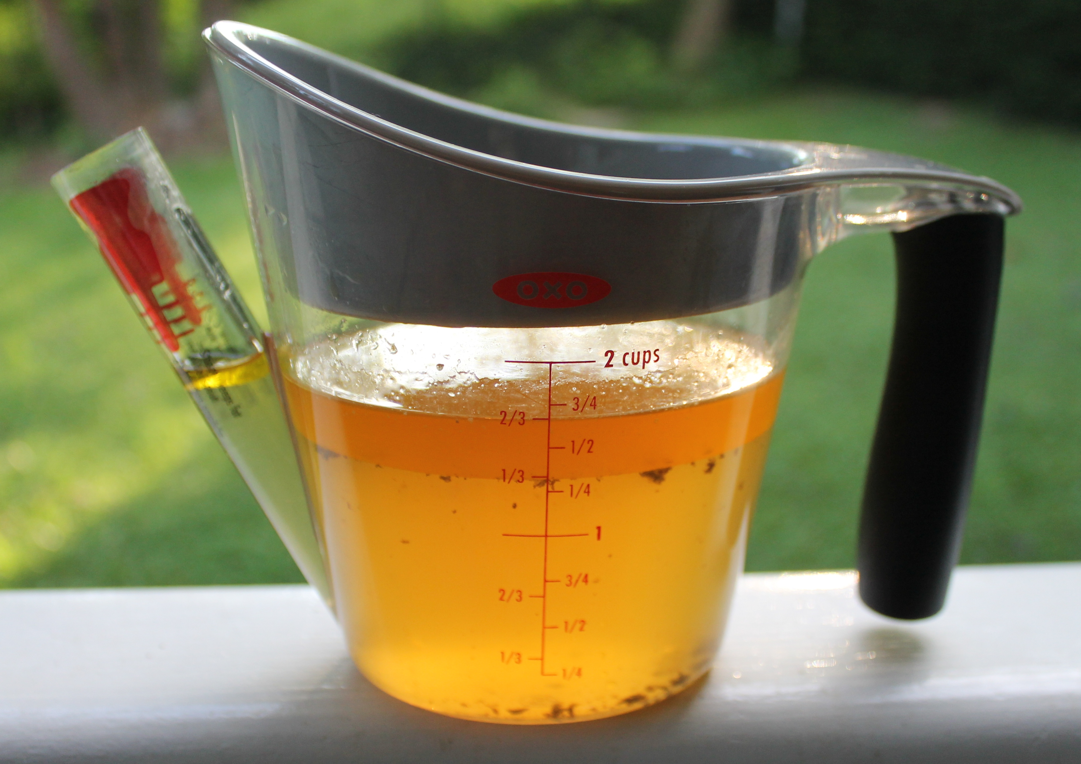 Fetttrenner